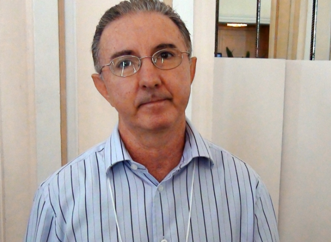 Treinador de Futebol